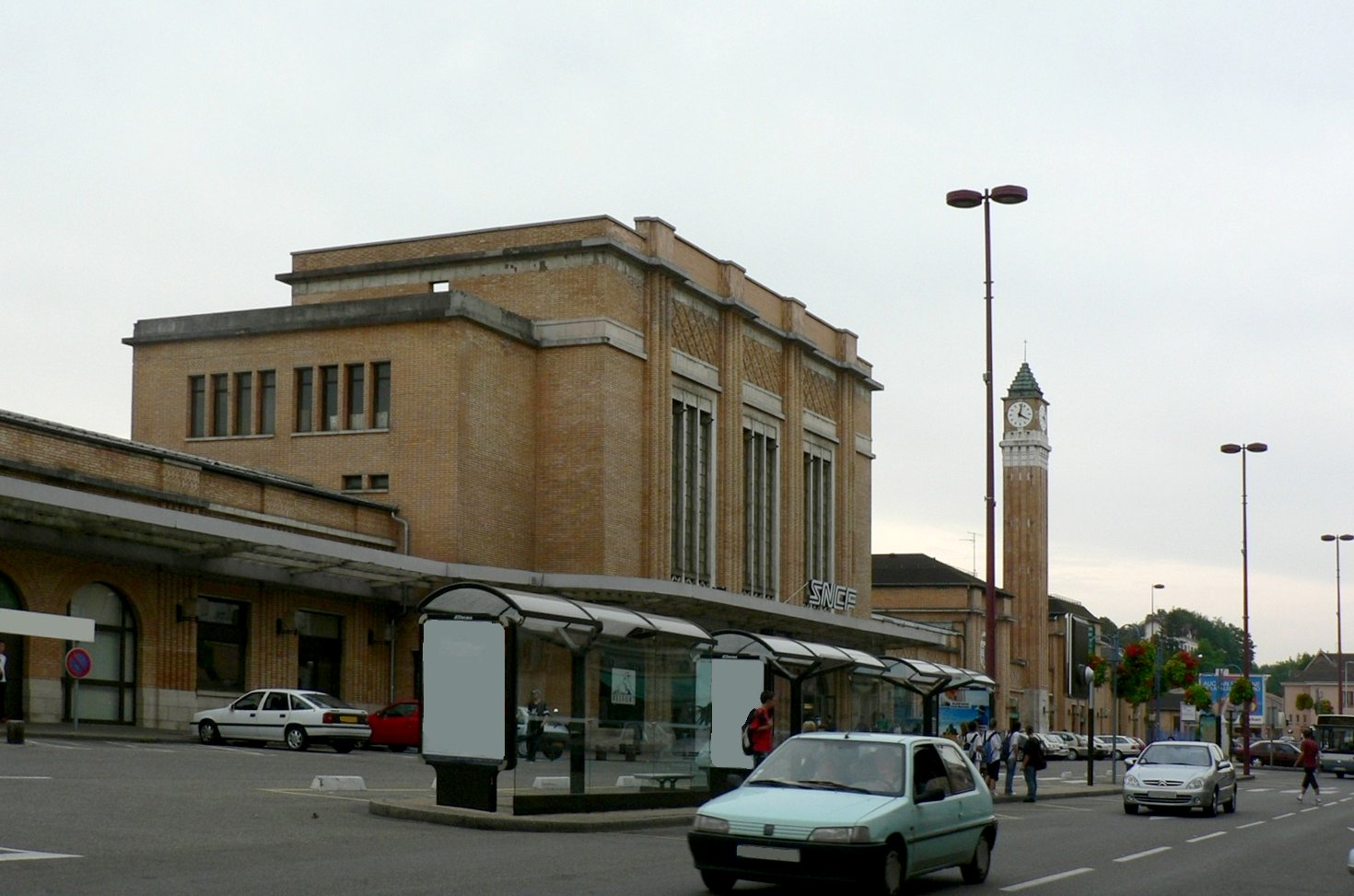 Gare Belfort